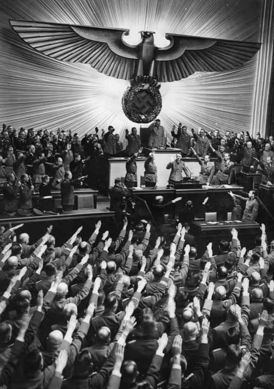 Die Sitzung des Grossdeutschen Reichstags am 11. November 1941. Die Welthistorische Sitzung des Grossdeutschen Reichstags am 11. November 1941. Ungeheurer Jubel brandete dem Führer entgegen als er die Rednerbühne betritt. Abgebildete Personen: Hitler, Adolf: Reichskanzler, Deutschland Göring, Hermann: Reichsmarschall, Oberbefehlshaber der Luftwaffe, Ministerpräsident von Preußen, Deutschland Dietrich, Otto Dr.: SS-Obergruppenführer, Staatssekretär Reichspropagandaministerium, Deutschland Lammers, Hans-Heinrich Dr.: Reichsminister, Chef der Reichskanzlei, Deutschland Schaub, Julius: SS-Gruppenführer, persönlicher Adjutant Adolf Hitlers, Deutschland Ribbentrop, Joachim von: Außenminister, NSDAP, Deutschland Schwerin von Krosigk, Lutz Graf: Reichsfinanzminister, Deutschland